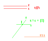 Posição de 2 retas, feito por Guilherme A. de M. e S. Teixeira Position of two straight lines, made by Guilherme A. de M. e S. Teixeira